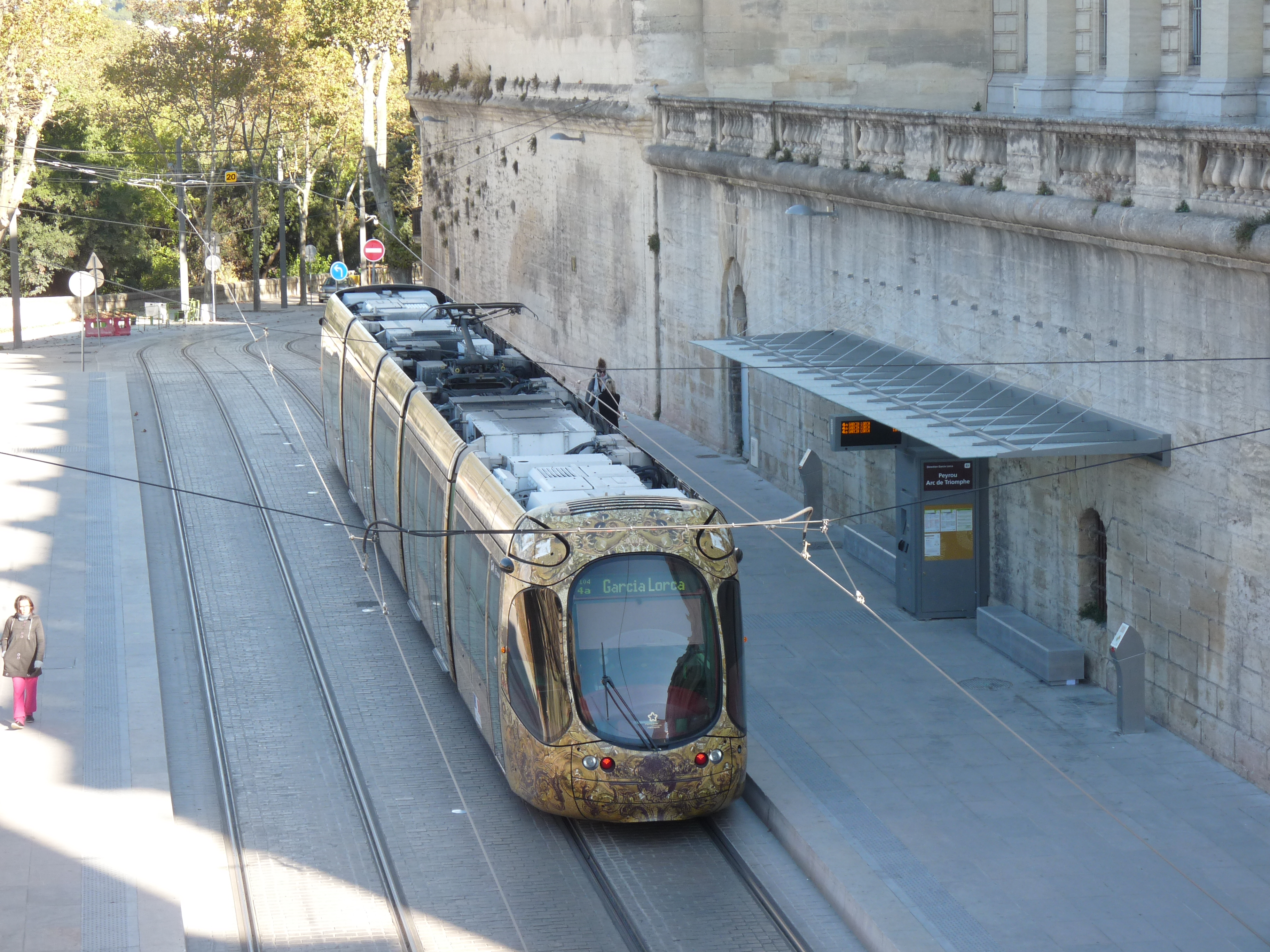 Nieuw traject van tramlijn 4 in Montpellier